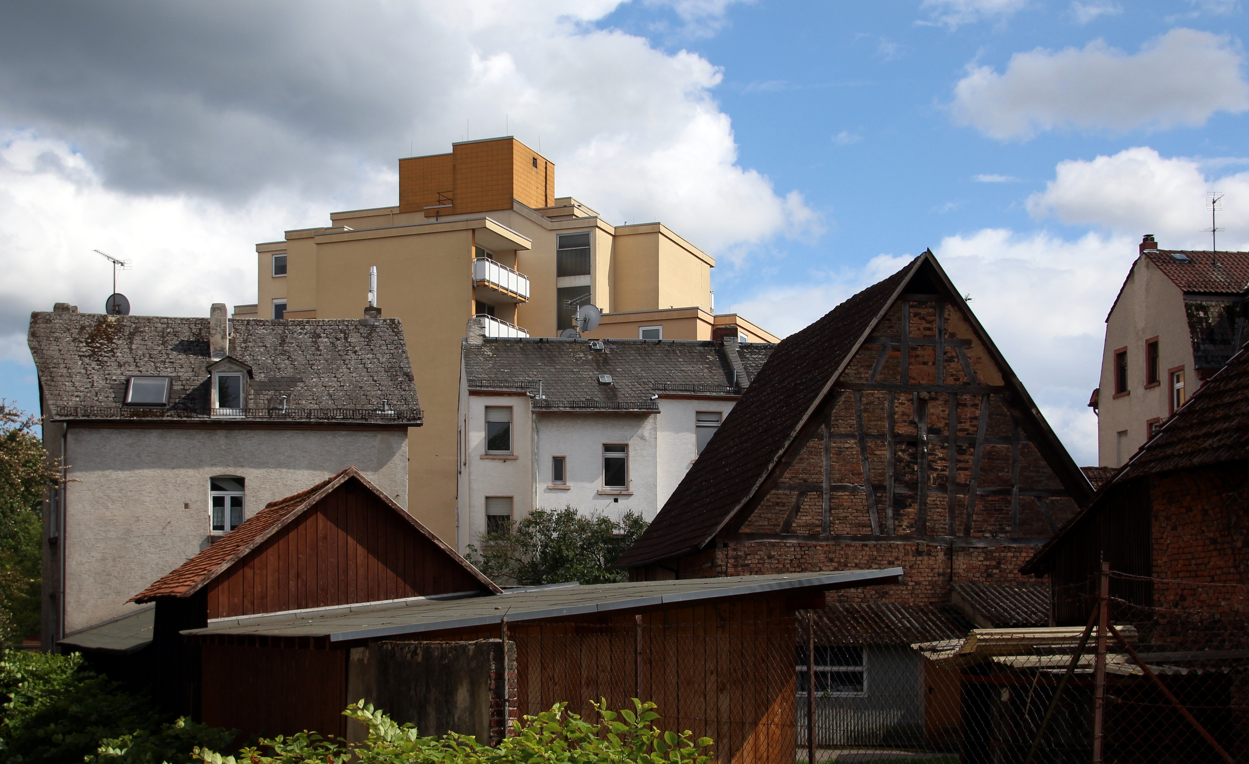 Alter Ortskern von Unterliederbach um den Liederbach